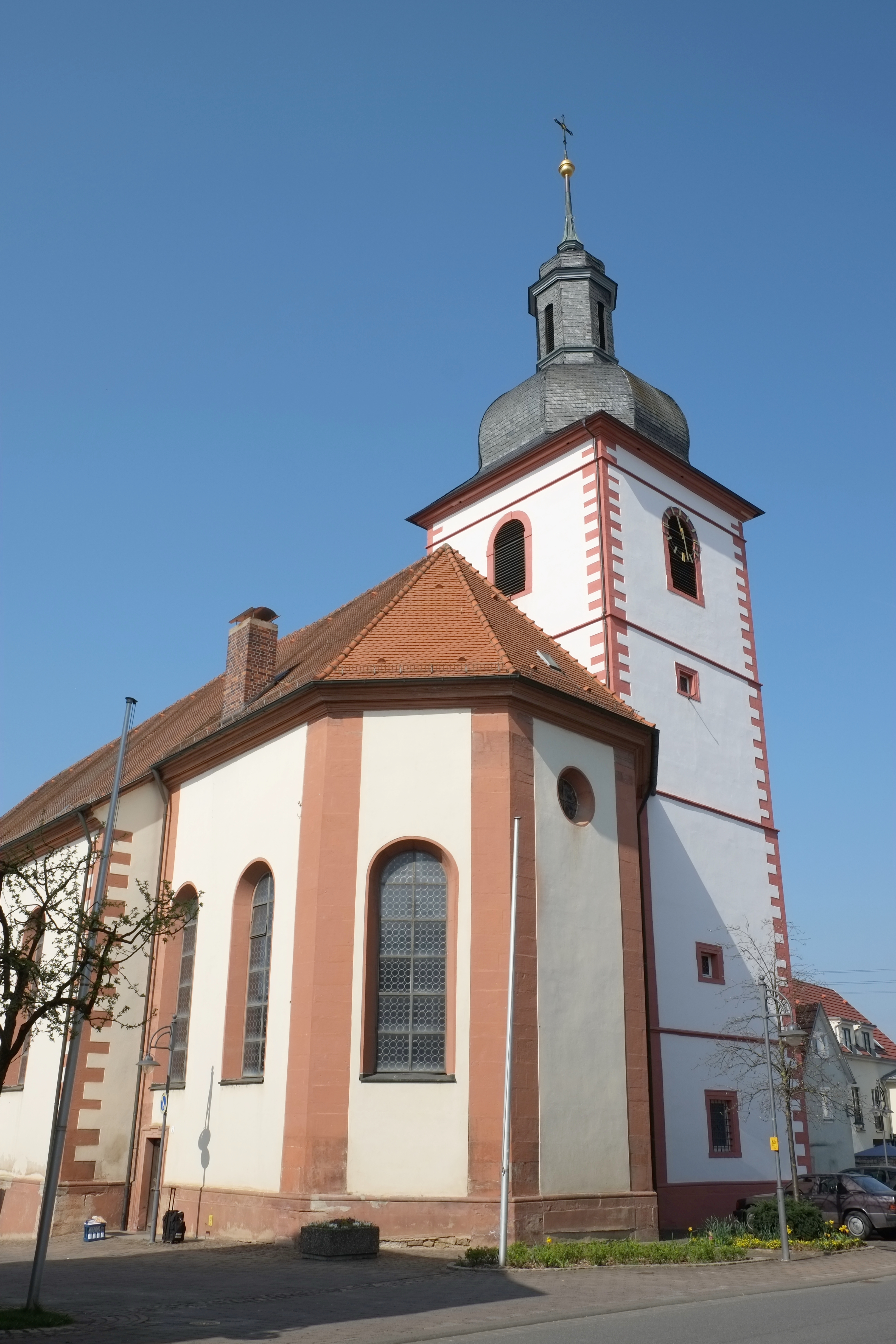 Pieta in der Kirche St. Markus in Distelhausen, einem Stadtteil von Tauberbischofsheim (Baden-Württemberg, Deutschland)